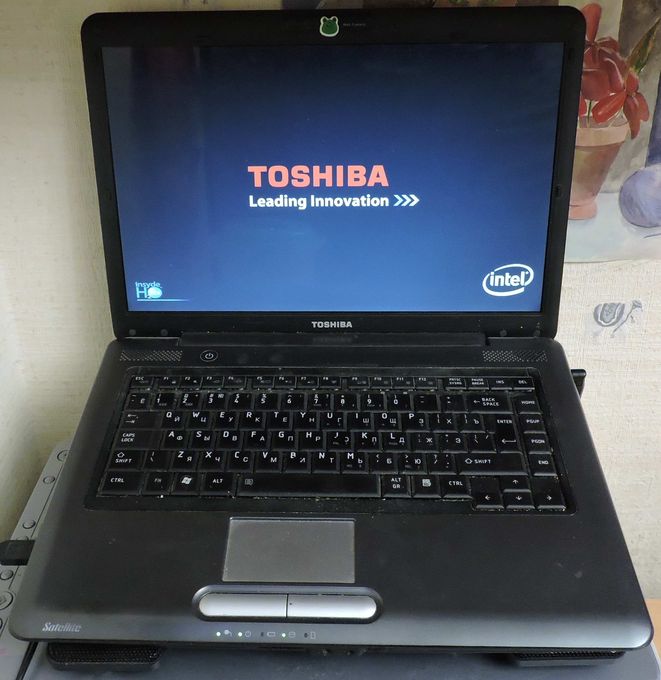 Toshiba Satellite A300-214